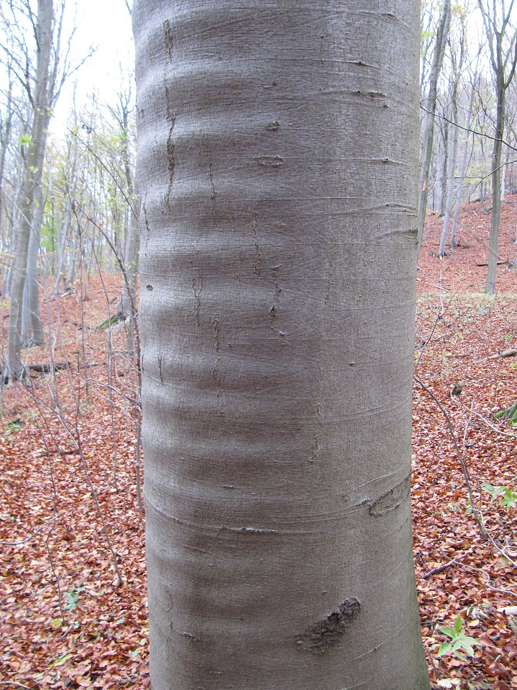 Wimmerwuchs an Buche (Fagus sylvatica), Hessische Schweiz